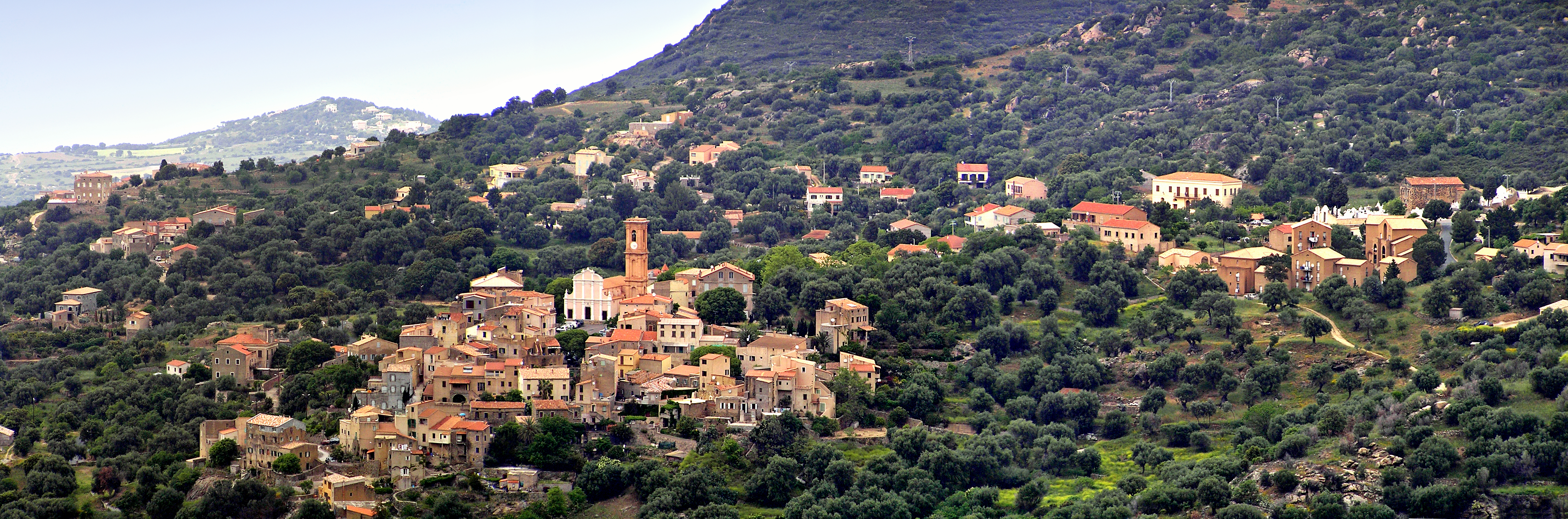 Aregno, Balagne (Corse) - Panorama d'Aregno depuis Cateri